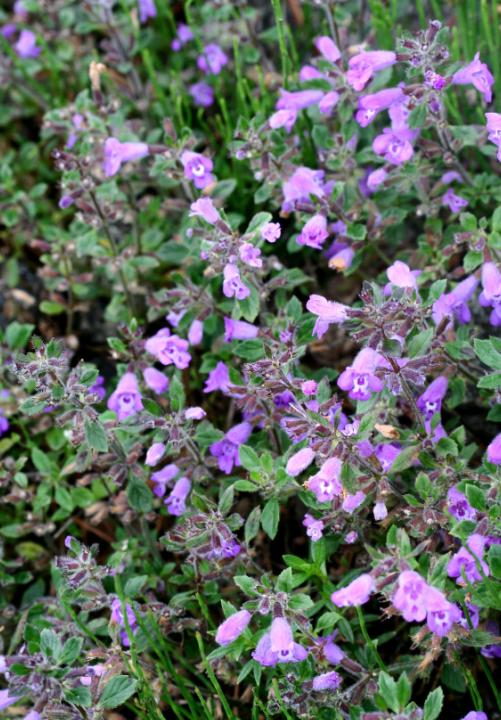 Acinos alpinus